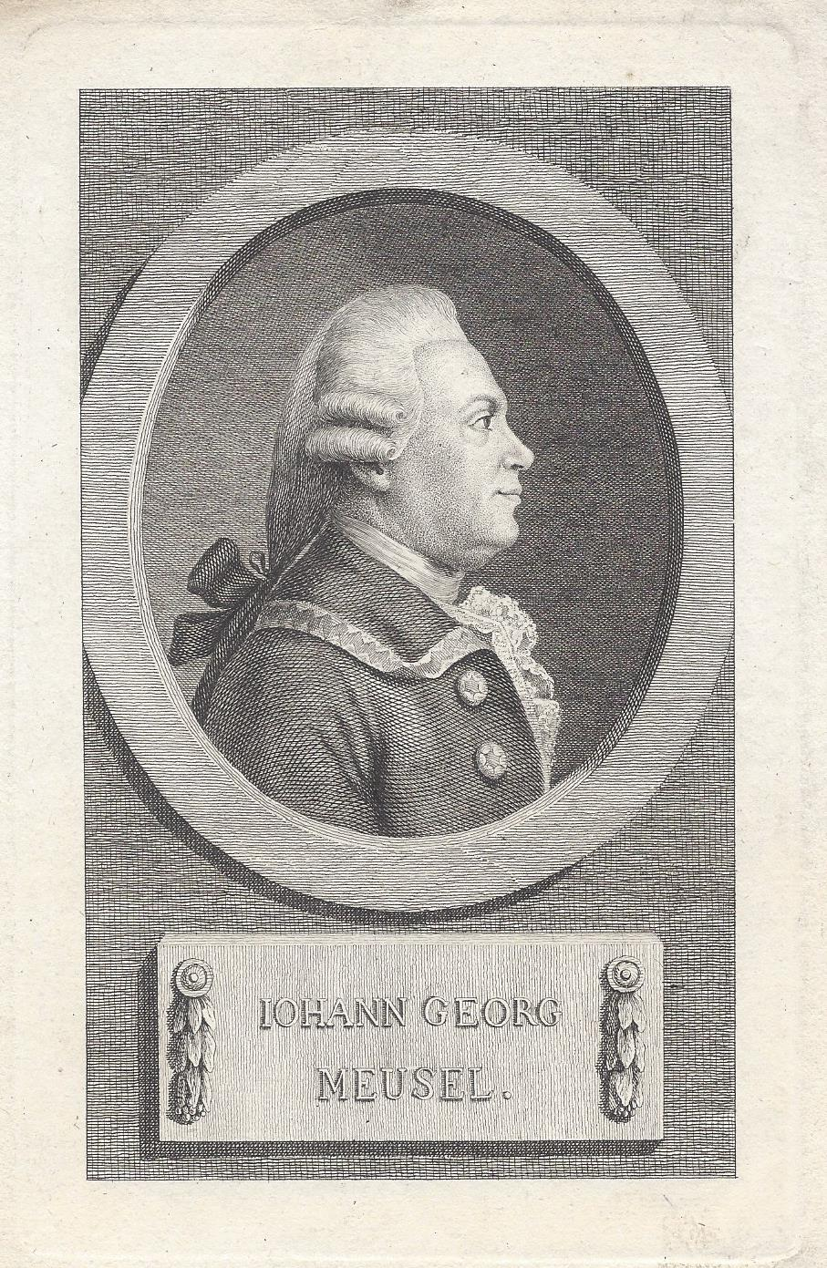 Johann Georg Meusel (1743-1820), Frontispiz zur Allgemeinen deutschen Bibliothek. 95.Band, erstes Stück, 1790, Stecher Eberhard Siegfried Henne(1759-1828)